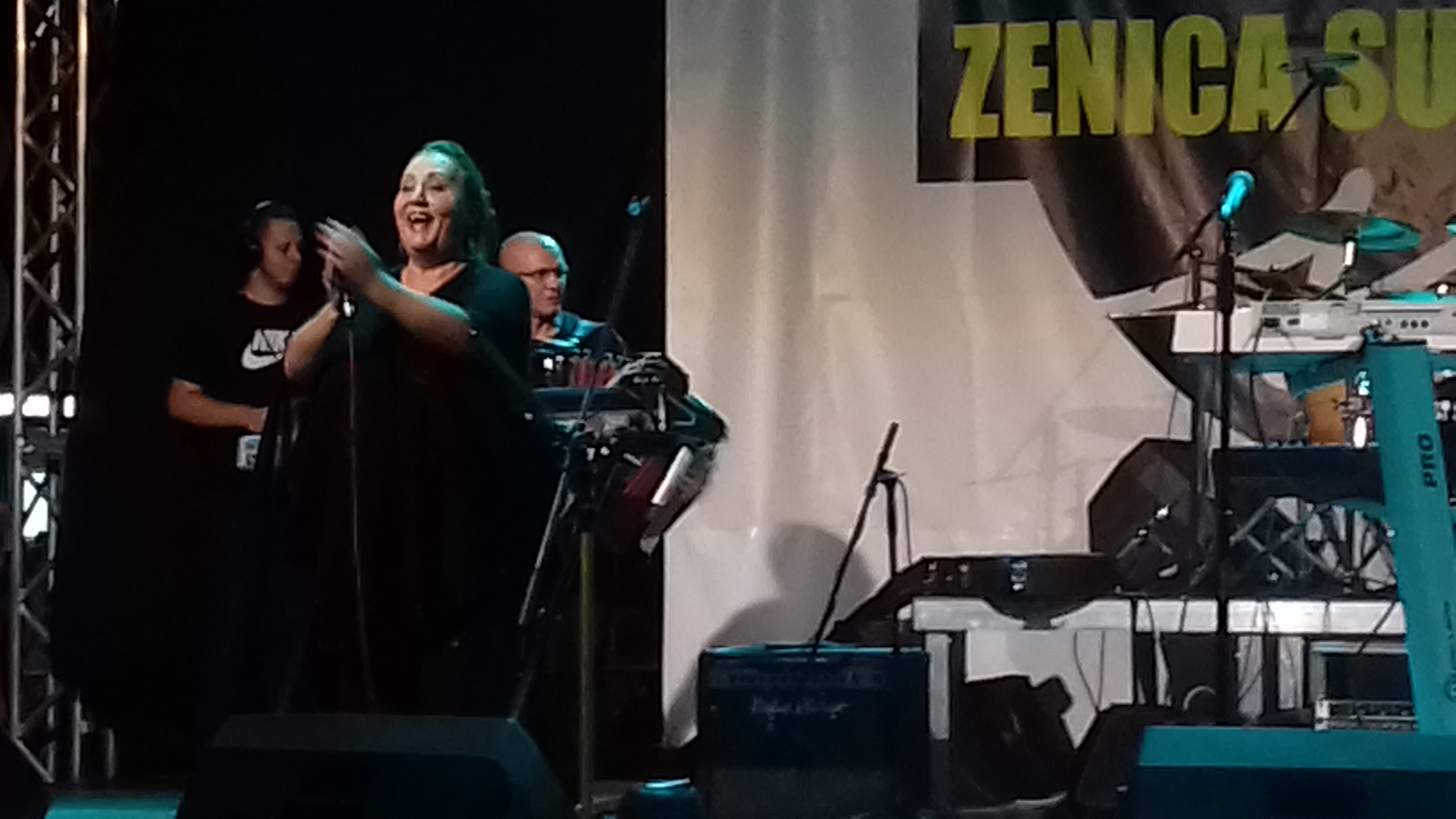 Hasiba Agić, Svjetski a naši, 15. noć Zenica summer festa